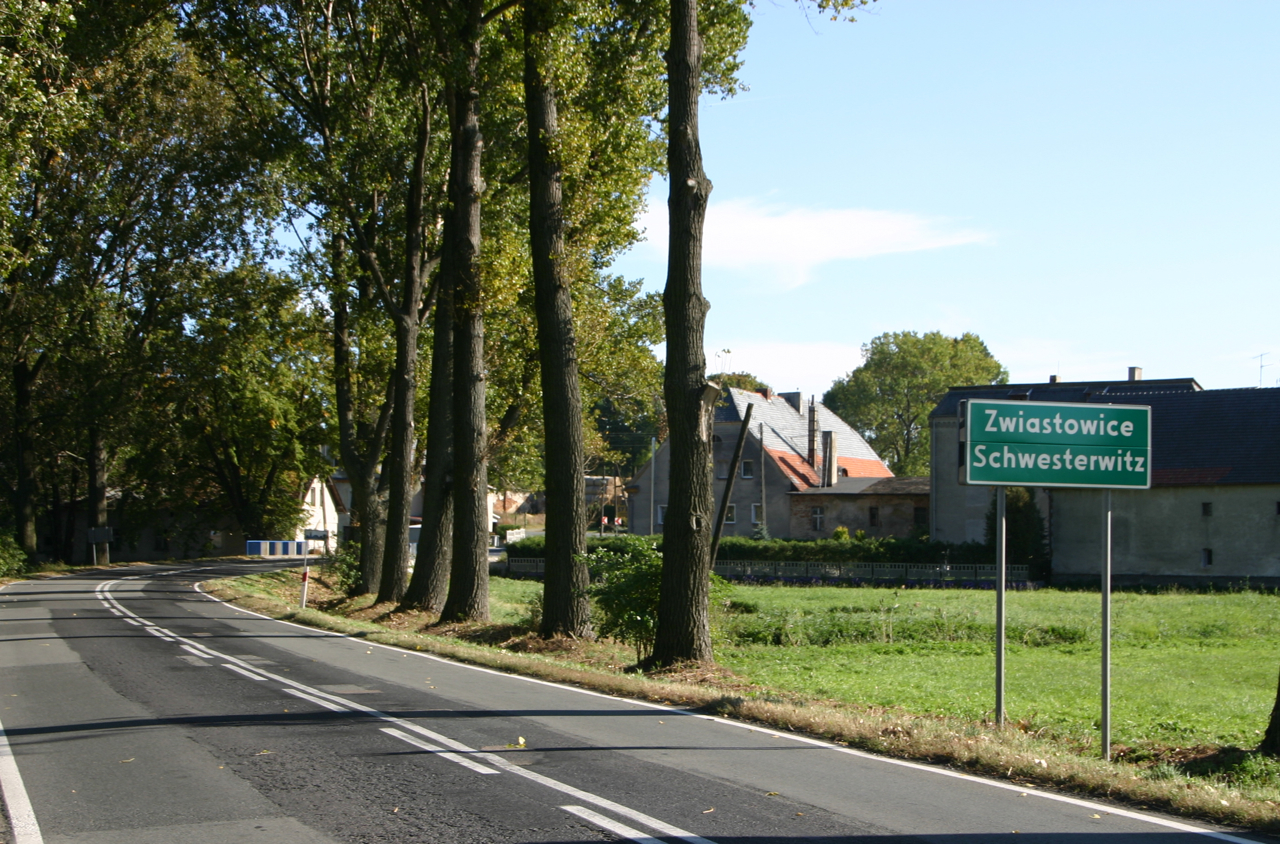 Zwiastowice (dodatkowa nazwa w j. niem. Schwesterwitz) – wieś w Polsce położona w województwie opolskim, w powiecie prudnickim, w gminie Głogówek.